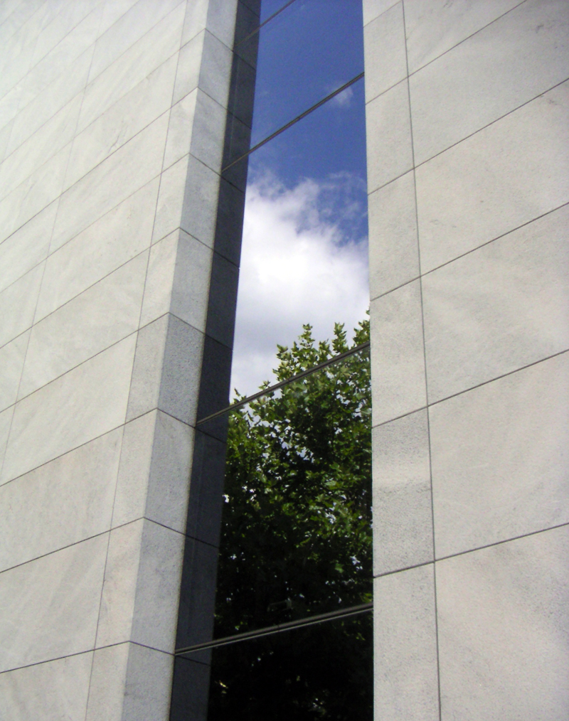 Lichteinlass am Kärntner Landesarchiv, selbst fotografiert first uploaded on de-WP: 2:04, 5. Aug 2005 Benutzer:Binter